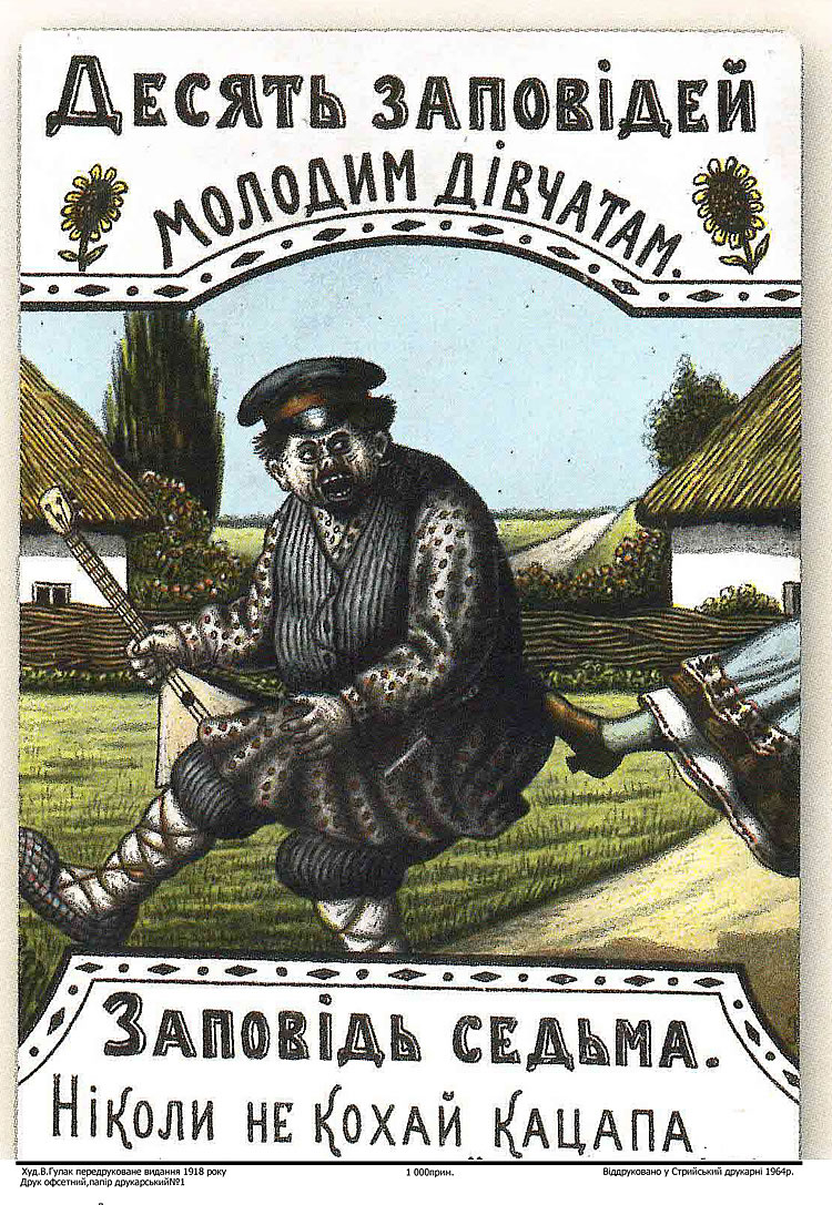 Василий Гулак. Десять заповидей молодым дивчатам. Открытка 7 - "«Николы не кохай кацапа.» Открытка 1918 года.